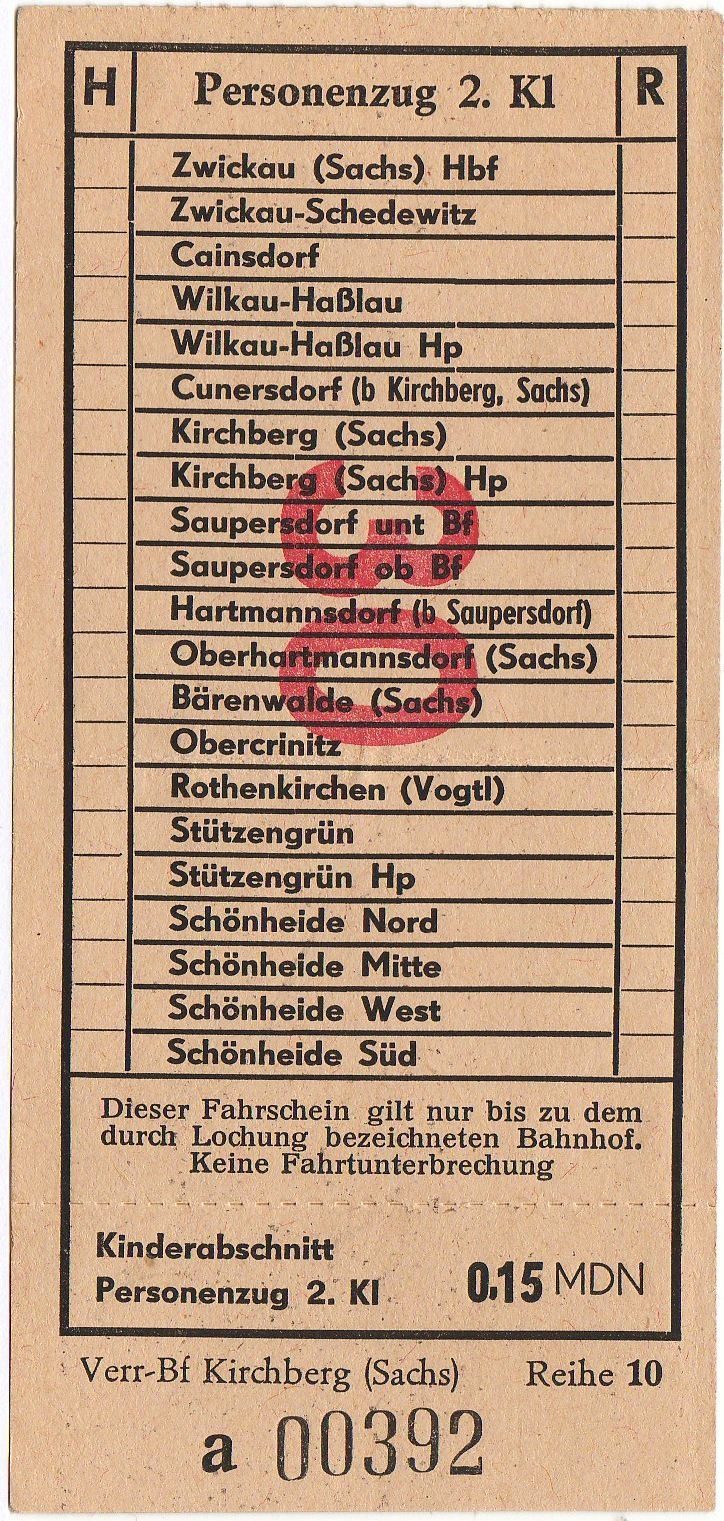 Kinder-Fahrschein für die Schmalspurbahn Wilkau-Haßlau–Carlsfeld. Die Fahrkarte wird im Zeitraum zwischen 22. Mai 1966 und Ende der 1960er Jahre herausgebracht worden sein. Am 22. Mai 1966 wurde der Streckenabschnitt zwischen Bahnhof Schönheide Süd und Carlsfeld eingestellt. Dieser Abschnitt ist auf dem Fahrschein schon nicht mehr vorhanden. Die Bezeichnung der DDR-Währung lautete nur zwischen 1. August 1964 und 31. Dezember 1967 MDN (= Mark der Deutschen Notenbank), danach M.